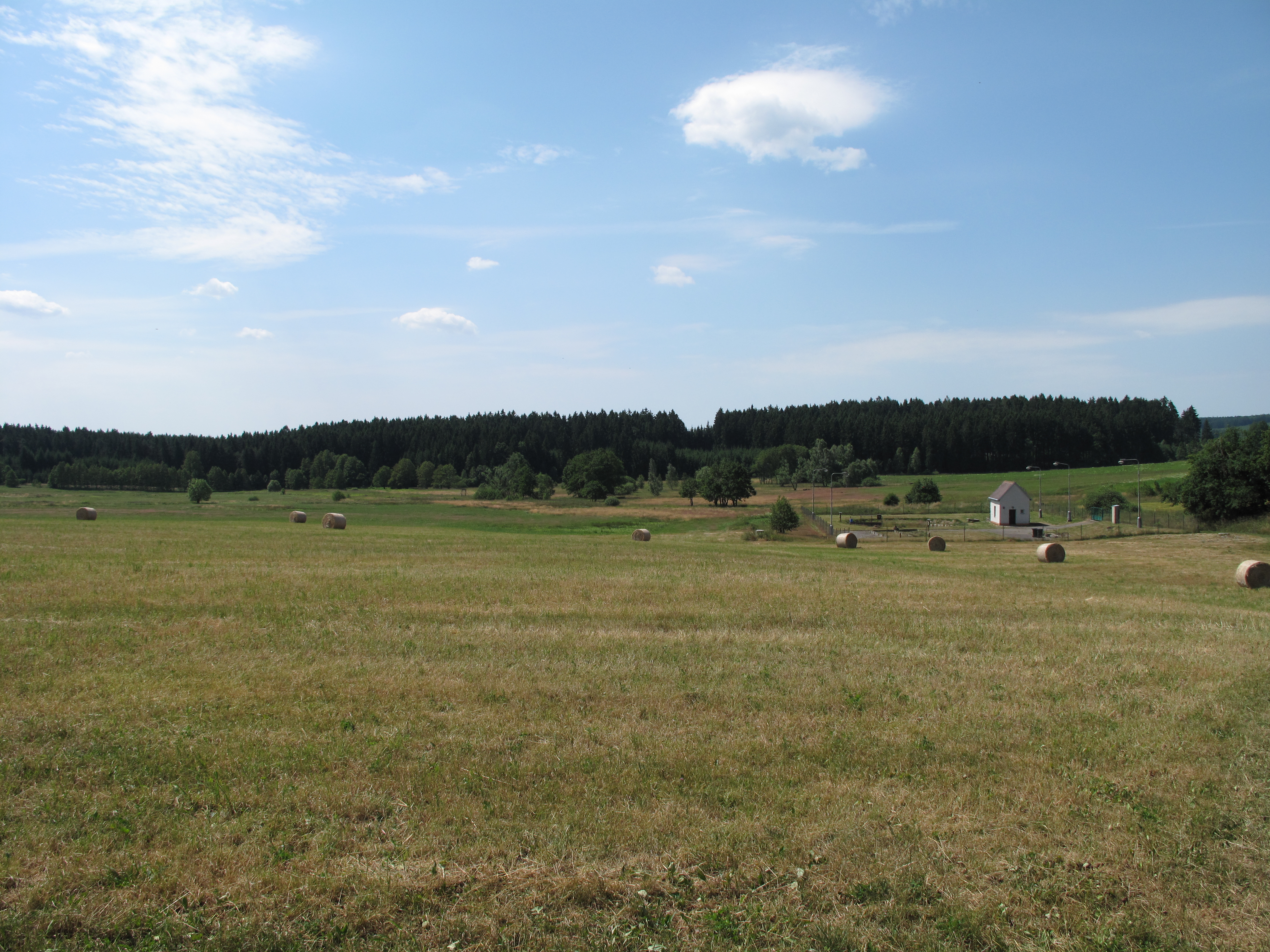 Přírodní rezervace Šimanovské rašeliniště. Okres Jihlava, Česká republika.